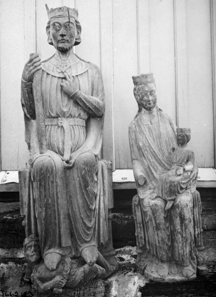 Träskulpturer, sittande Sankt Olof och Madonna. Delvis skadade, spår av färg. Snabbinv.